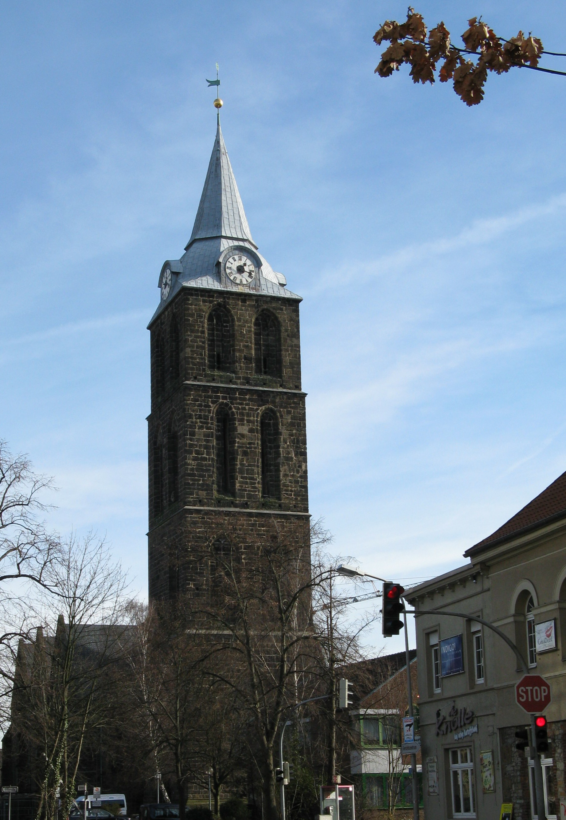 Der Turm der Marienkirche St. Marien in Minden, Nordrhein-Westfalen.